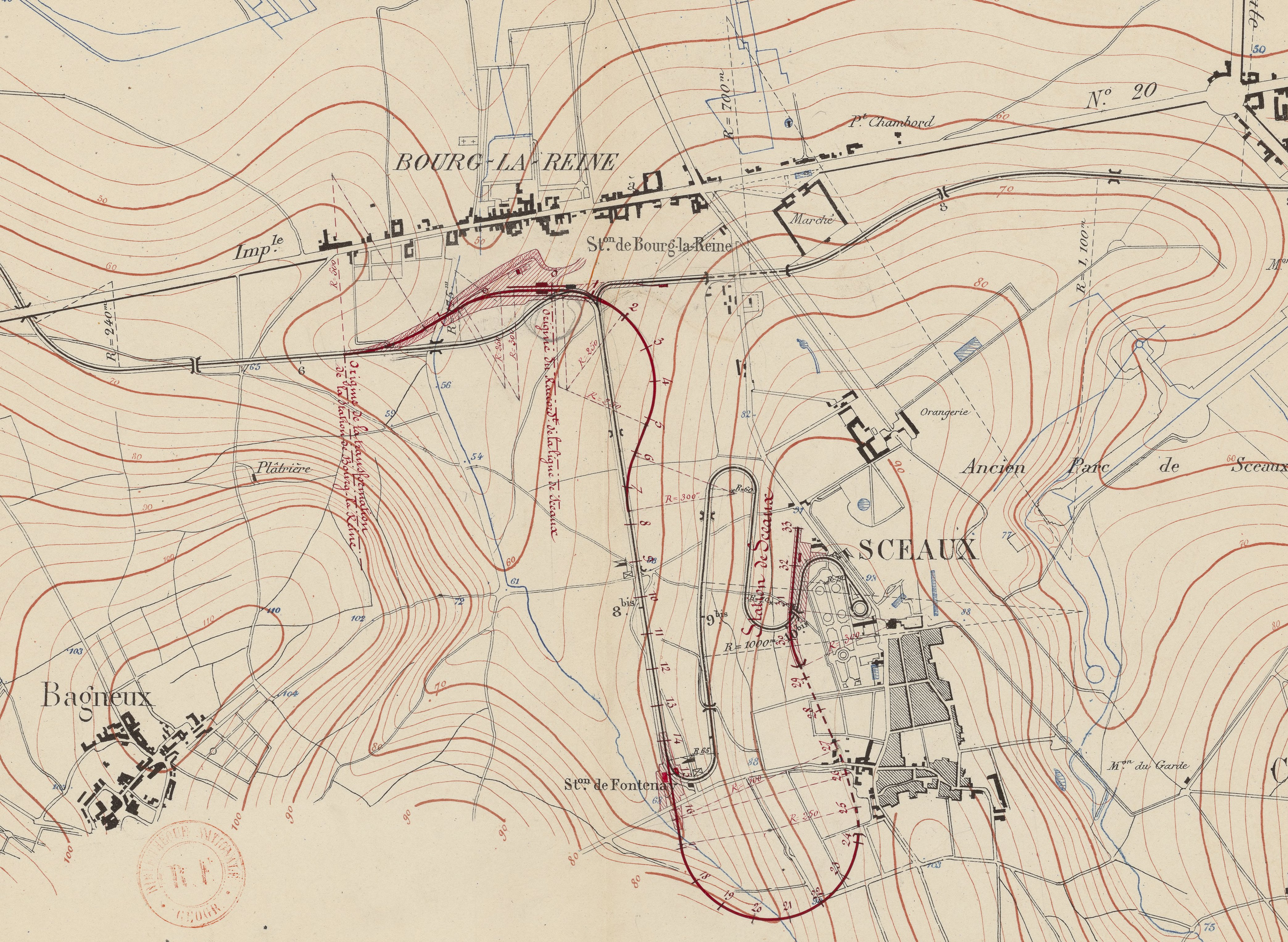 Projet de modification du chemin de fer de Bourg-la-Reine à Sceaux.